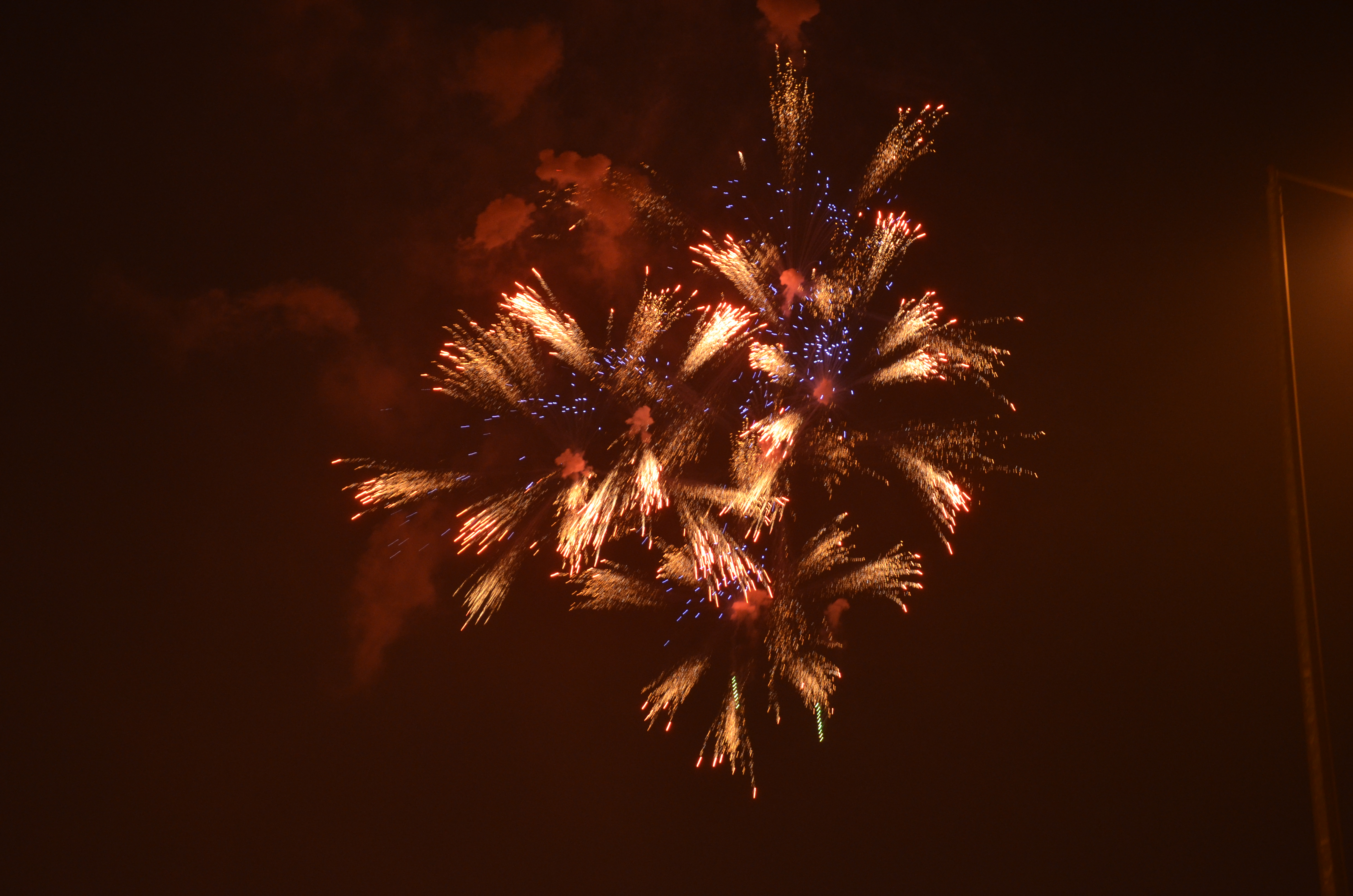 الالعاب النارية في سماء الرياض عيد الفطر 1433